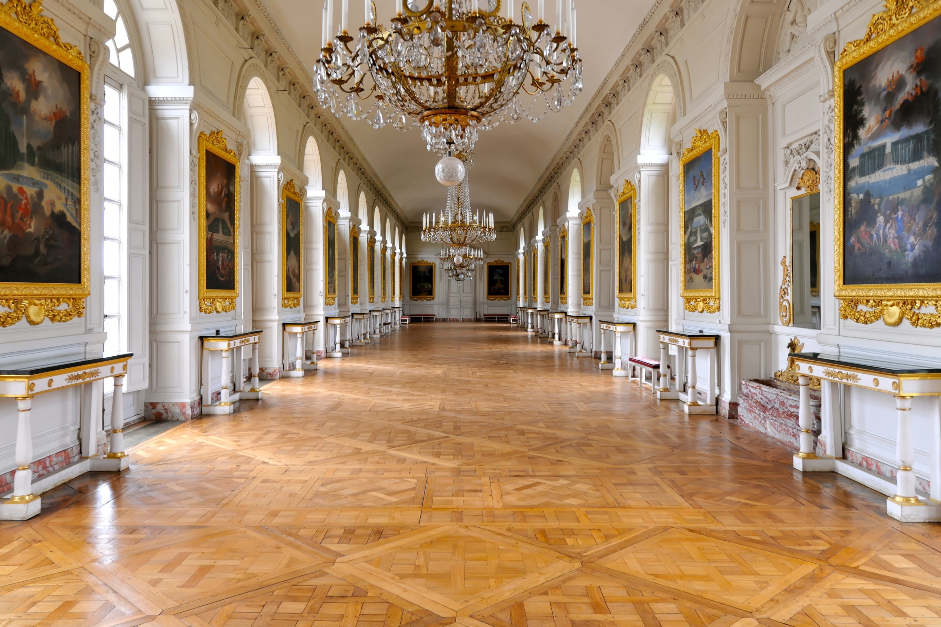 Galerie des Cotelle, du Grand Trianon du Château de Versailles.